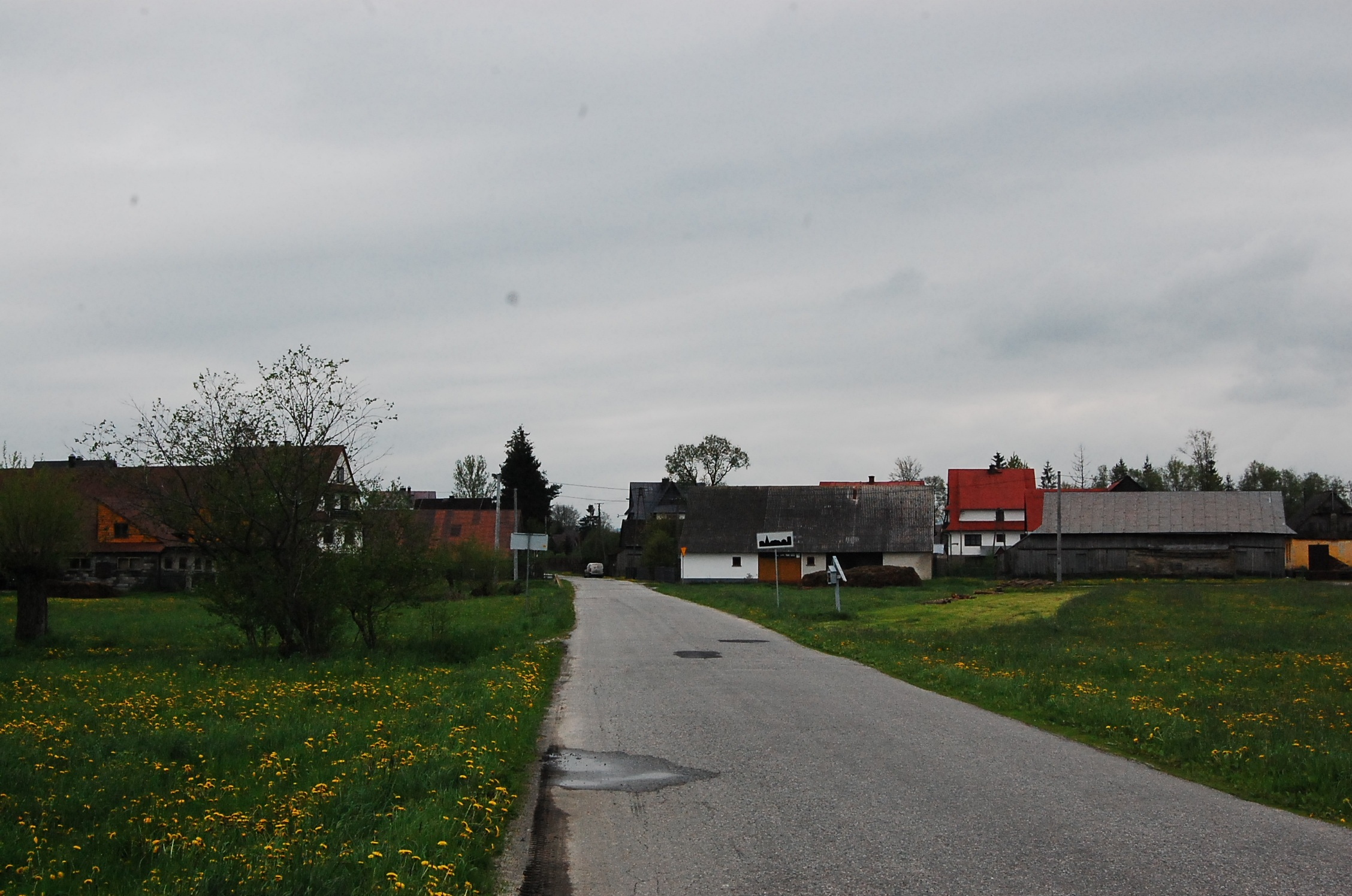 Długopole widok od strony działu